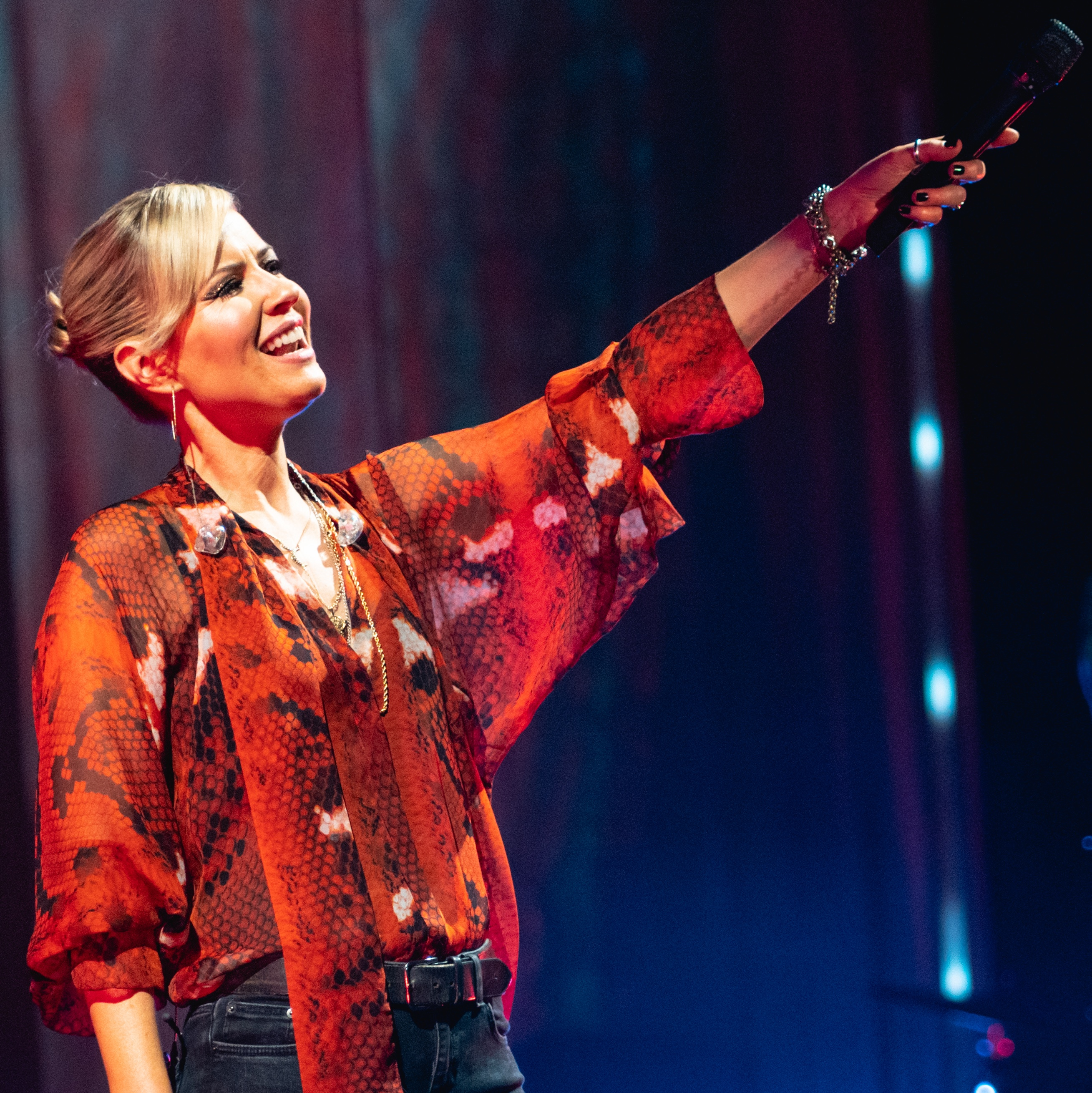 DidoHamm081219-40